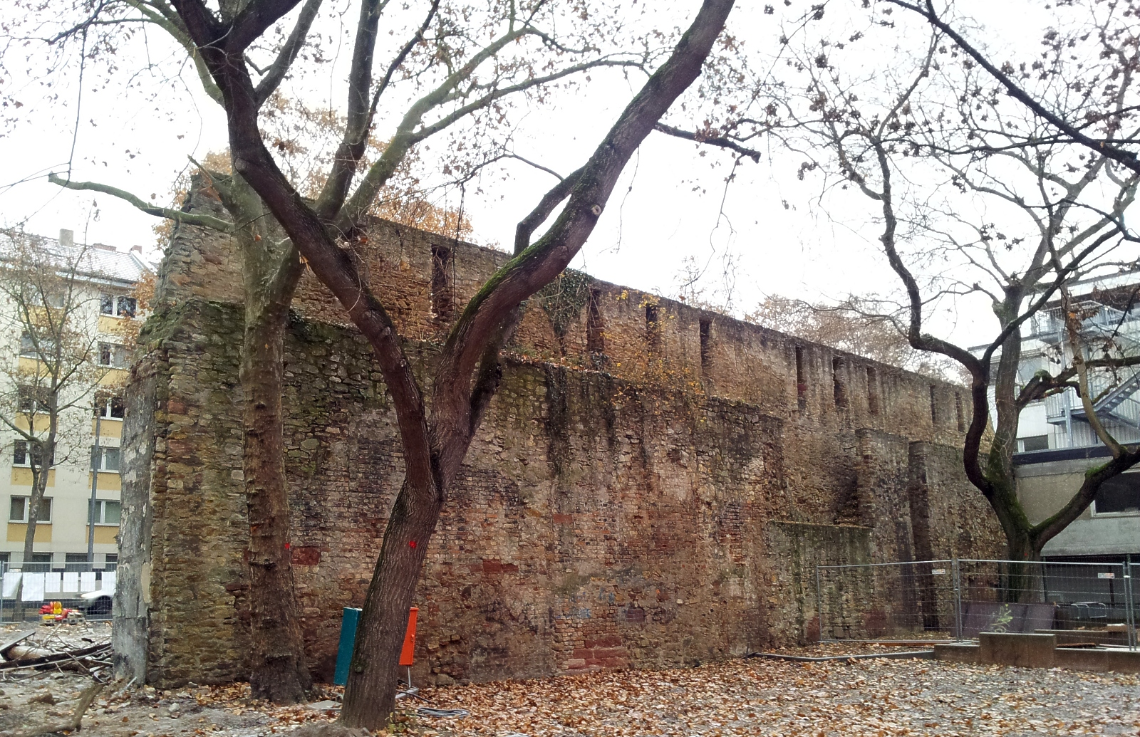 Die nun freistehende Stadtmauer von der Schlossergasse gesehen.